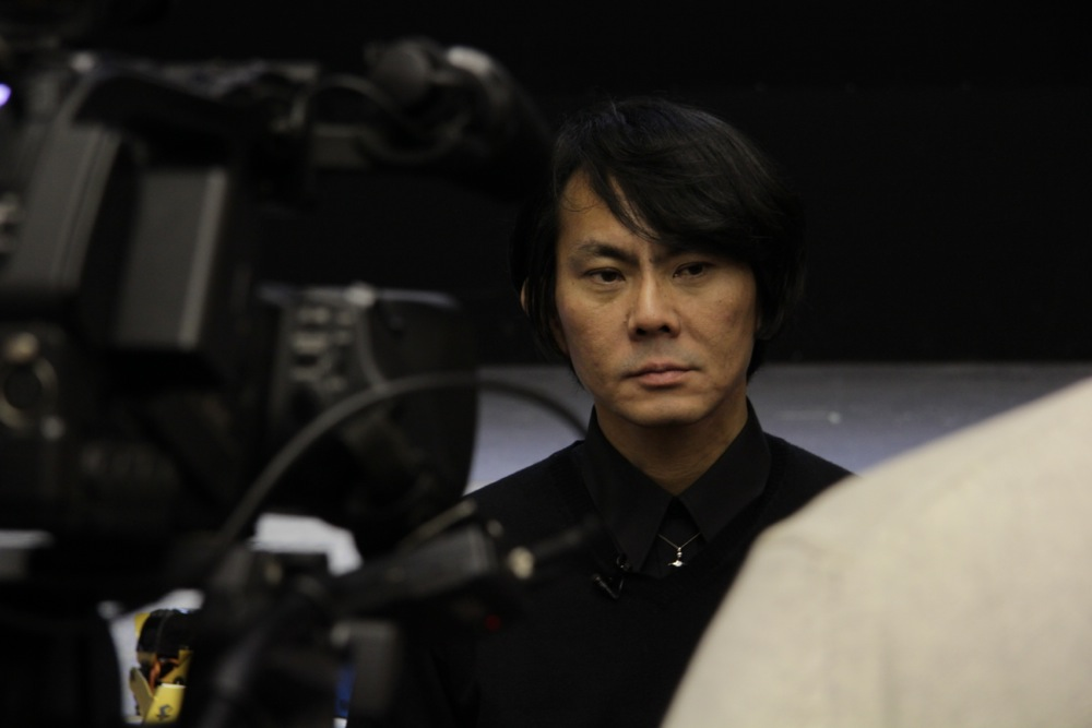 Hiroshi Ishiguro (Хироси Исигуро)